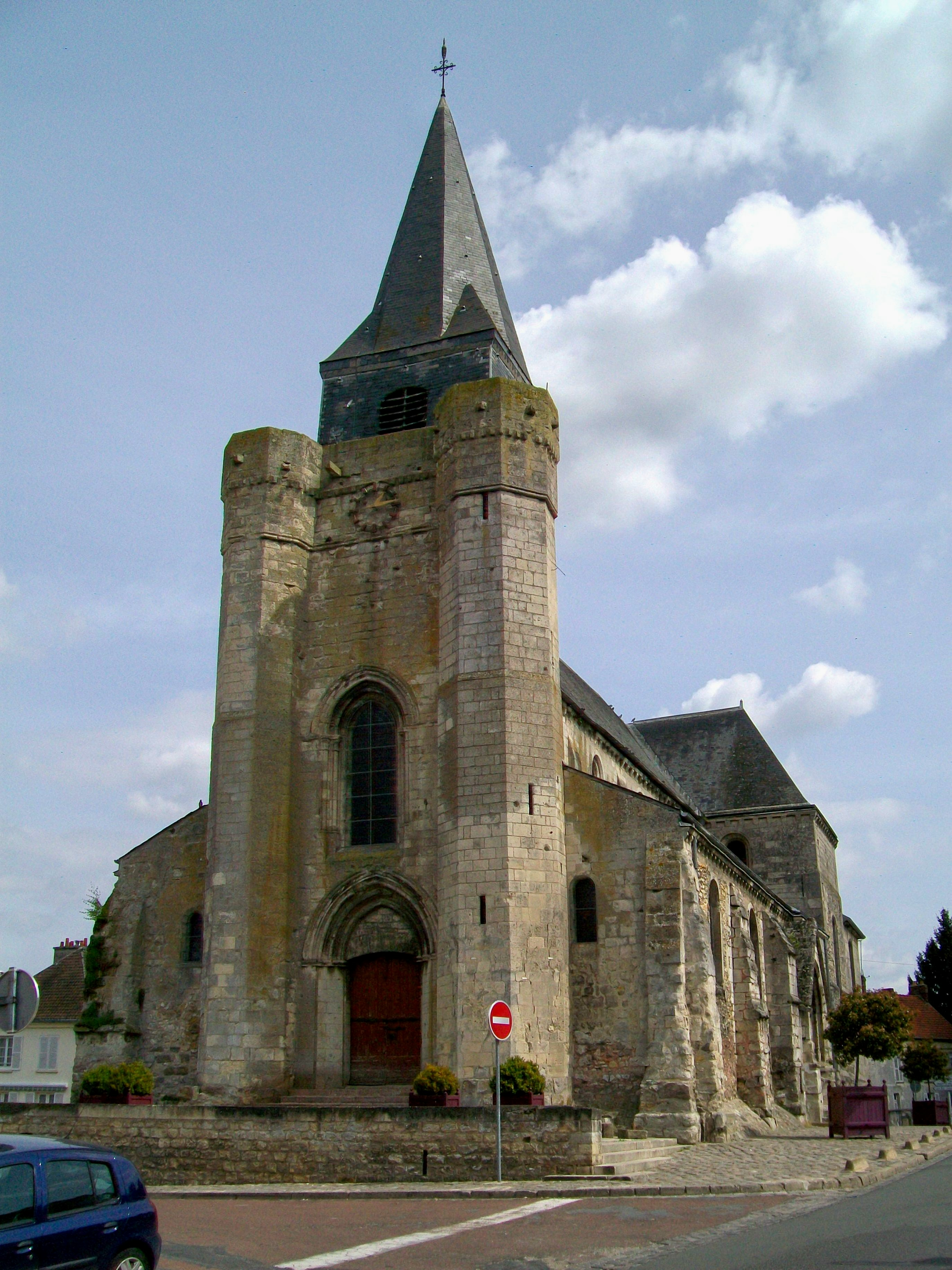 La façade ouest de l'église Saint-Pierre, classée Monuments historiques depuis 1908.